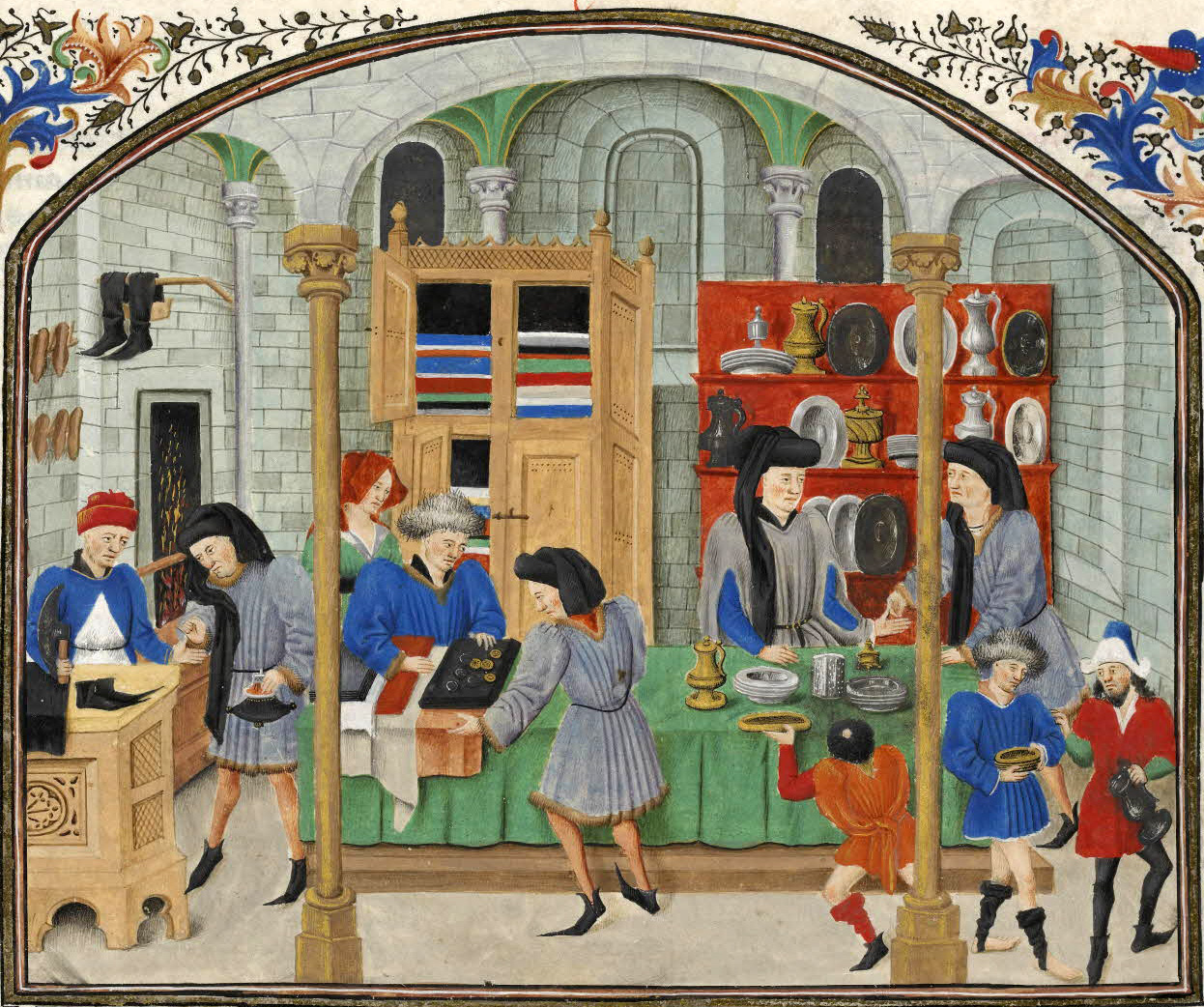 Средневековый рынок. Миниатюра к "Ethics, Politics, and Economics" (Rouen I.2 927) Аристотеля. XV век.